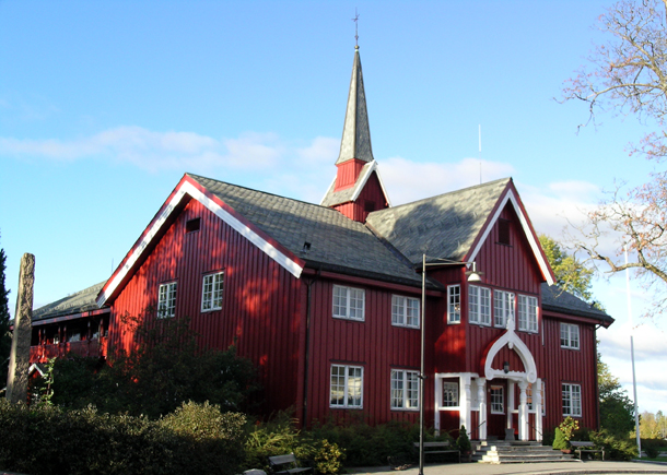 Herredshuset, Jessheim, Ullensaker, Norway.